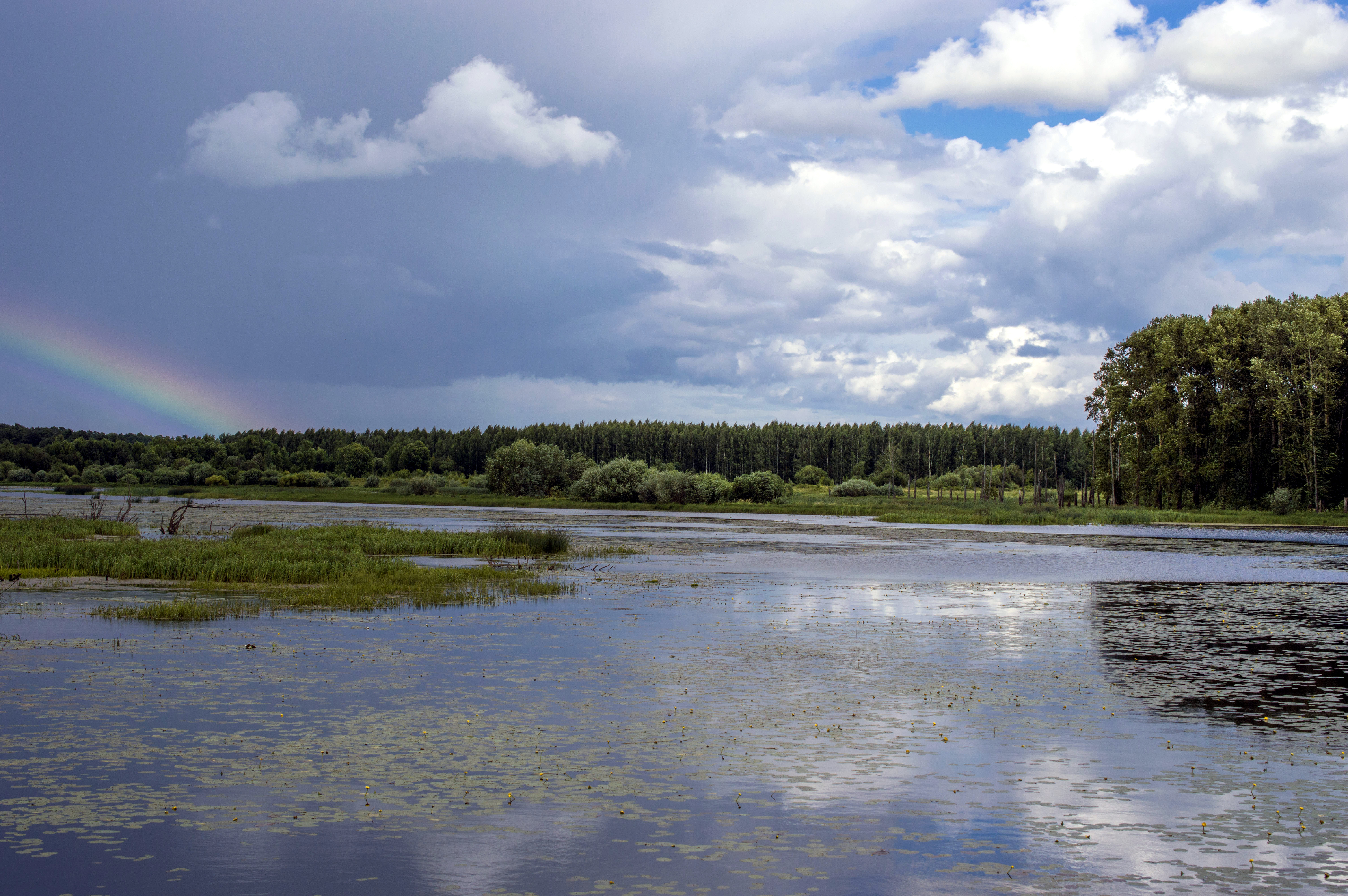 Река Сандаловка в черте города Кирова This image has been uploaded for Wikivoyage travel guide on Кировская область